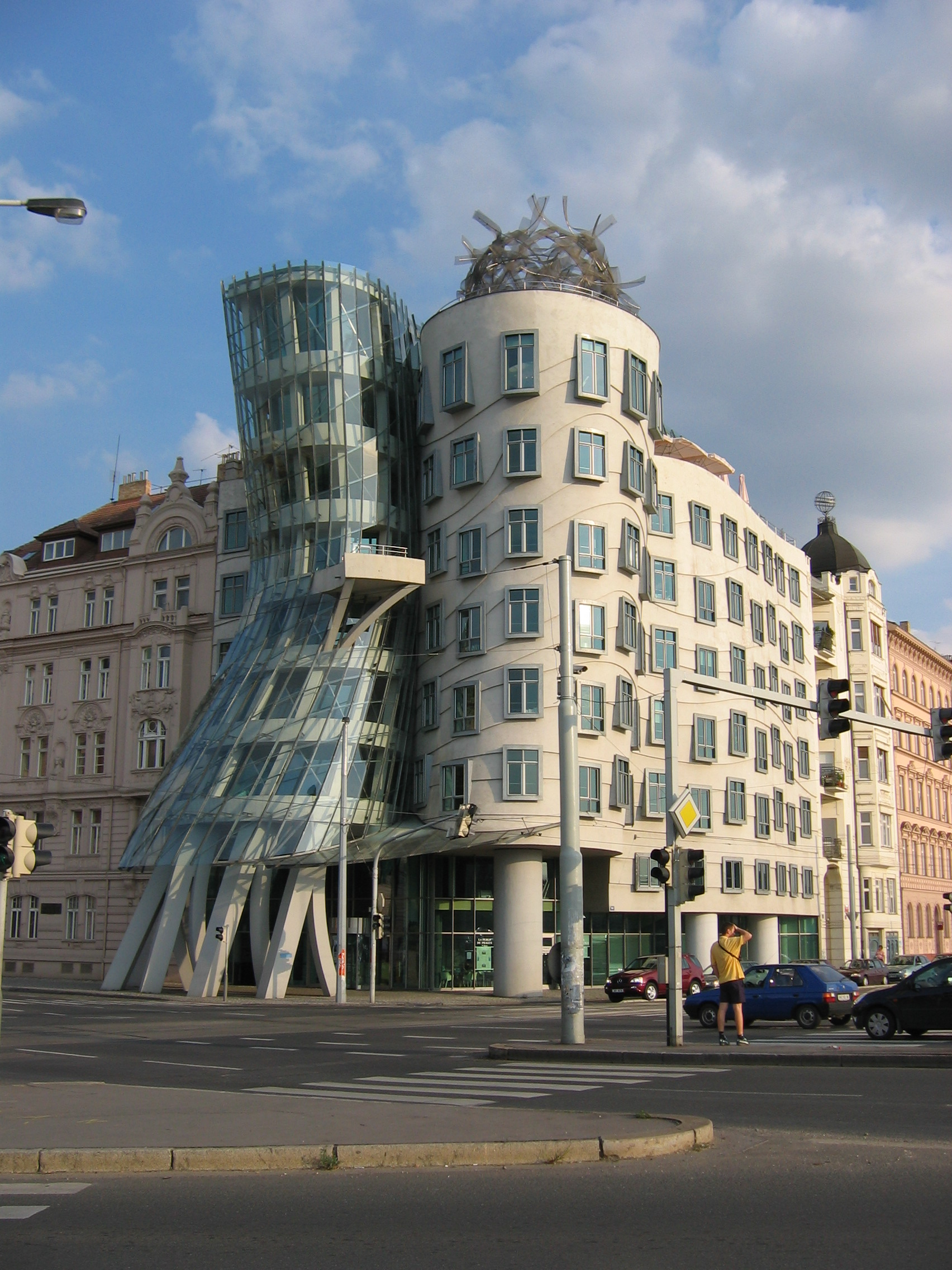 La Casa Danzante, tambíen conocida como Ginger and Fred, en Praga. Diseñada por el gabinete de arquitectos de Frank Gehry y Vlado Milunić.